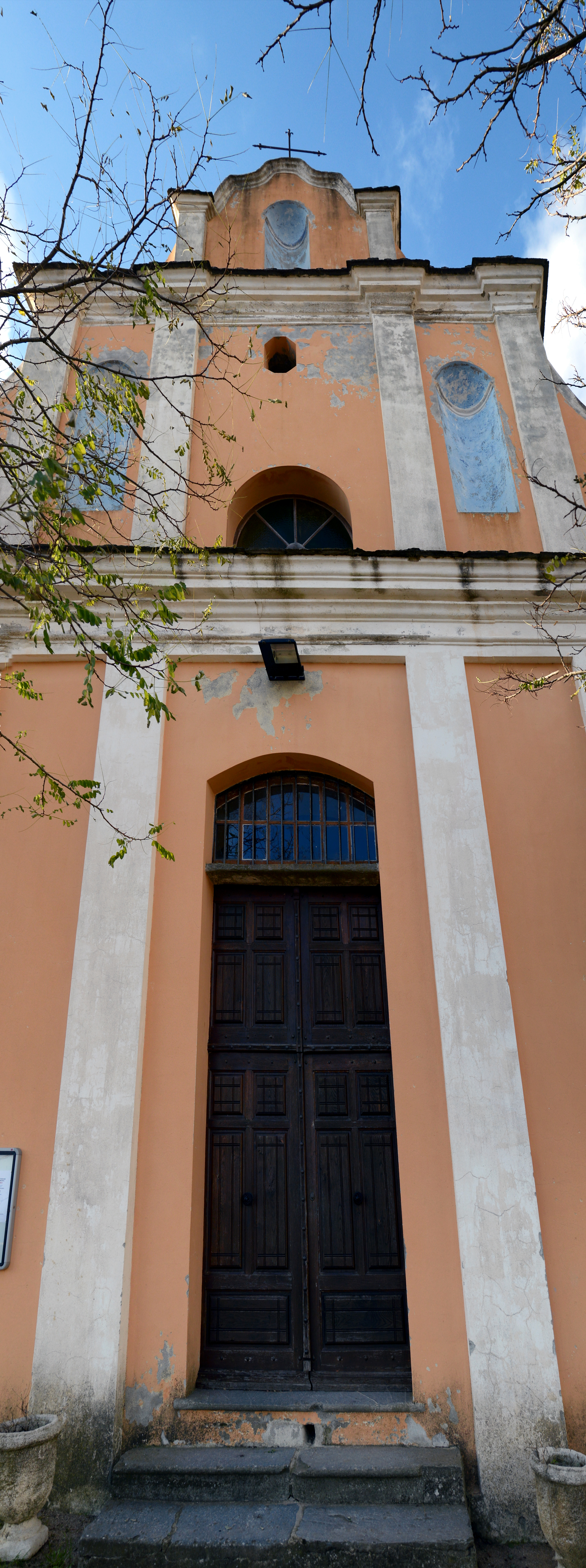 Pietraserena, Castagniccia (Haute-Corse) - façade principale de l'église paroissiale Saint-Roch